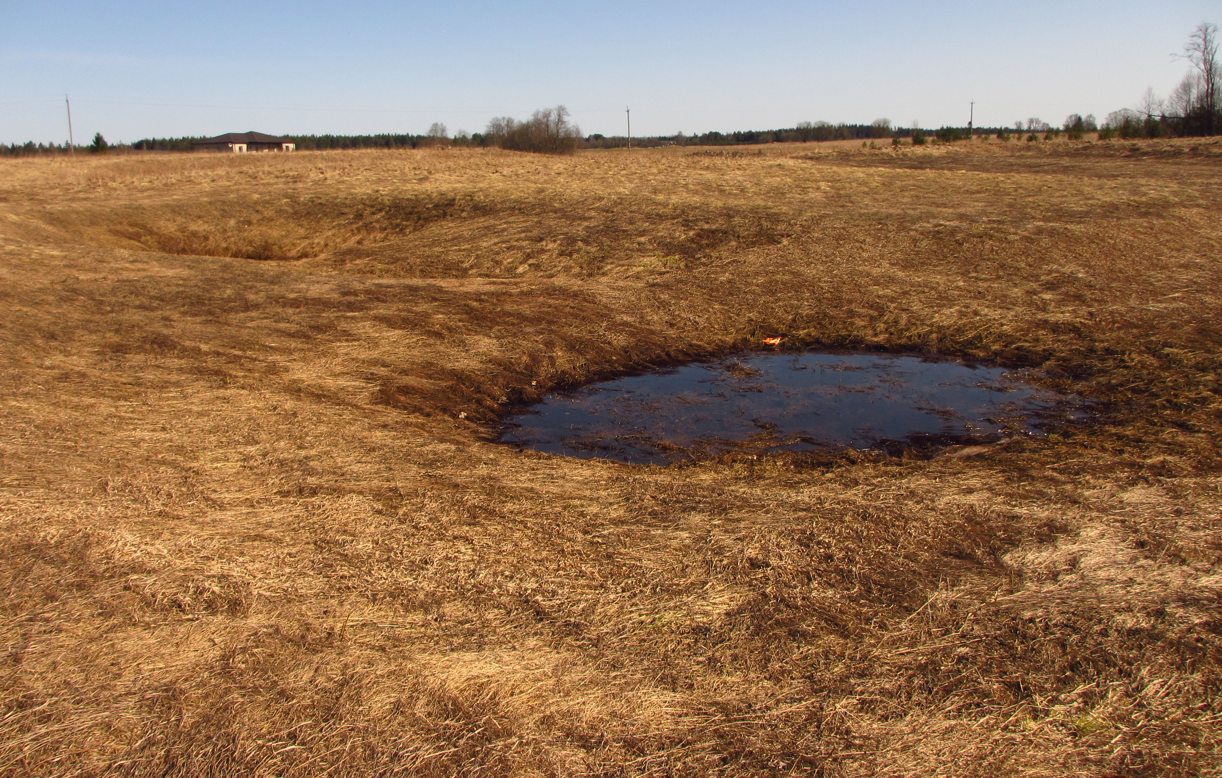 Hageri karstiala, Hageri alevik